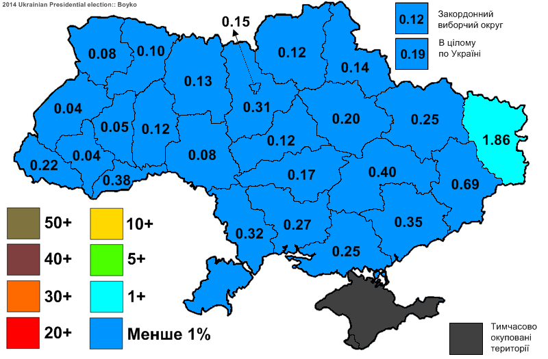 Електоральна підтримка Бойка Юрія Анатолійовича на виборах Президента України 2014.